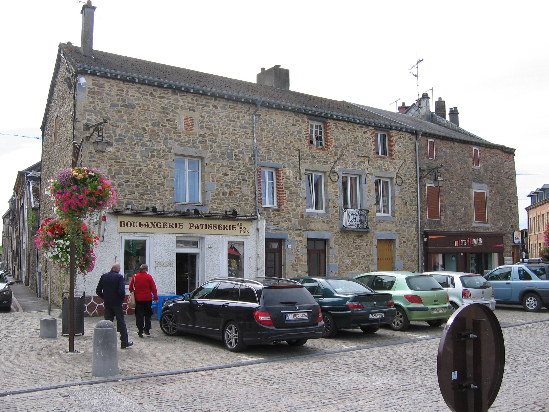 Rocroi, Ardennes, France, Place d'armes, maison de Marie-Catherine Monge et de son premier époux Jacques Horbon. Elle y vécue aussi avec Gaspard Monge.